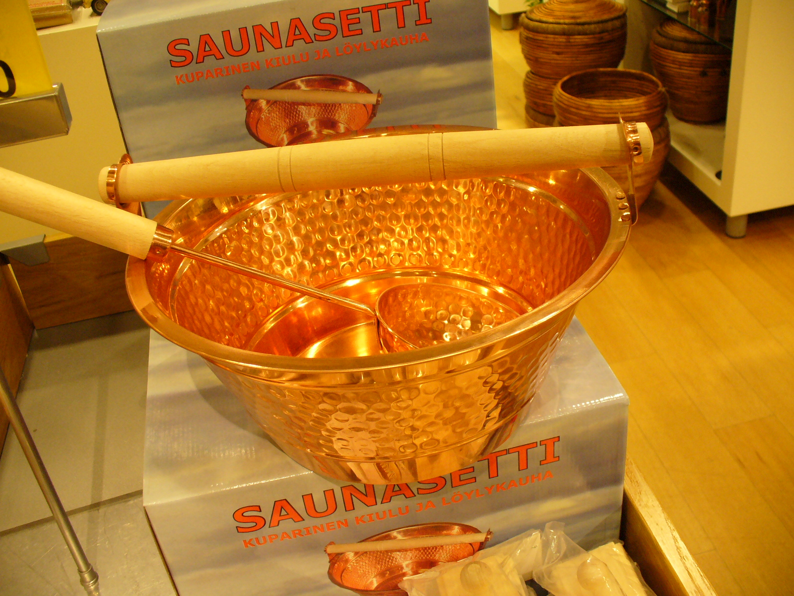 Szaunaszett dézsával és öntőkanállal, Finnország